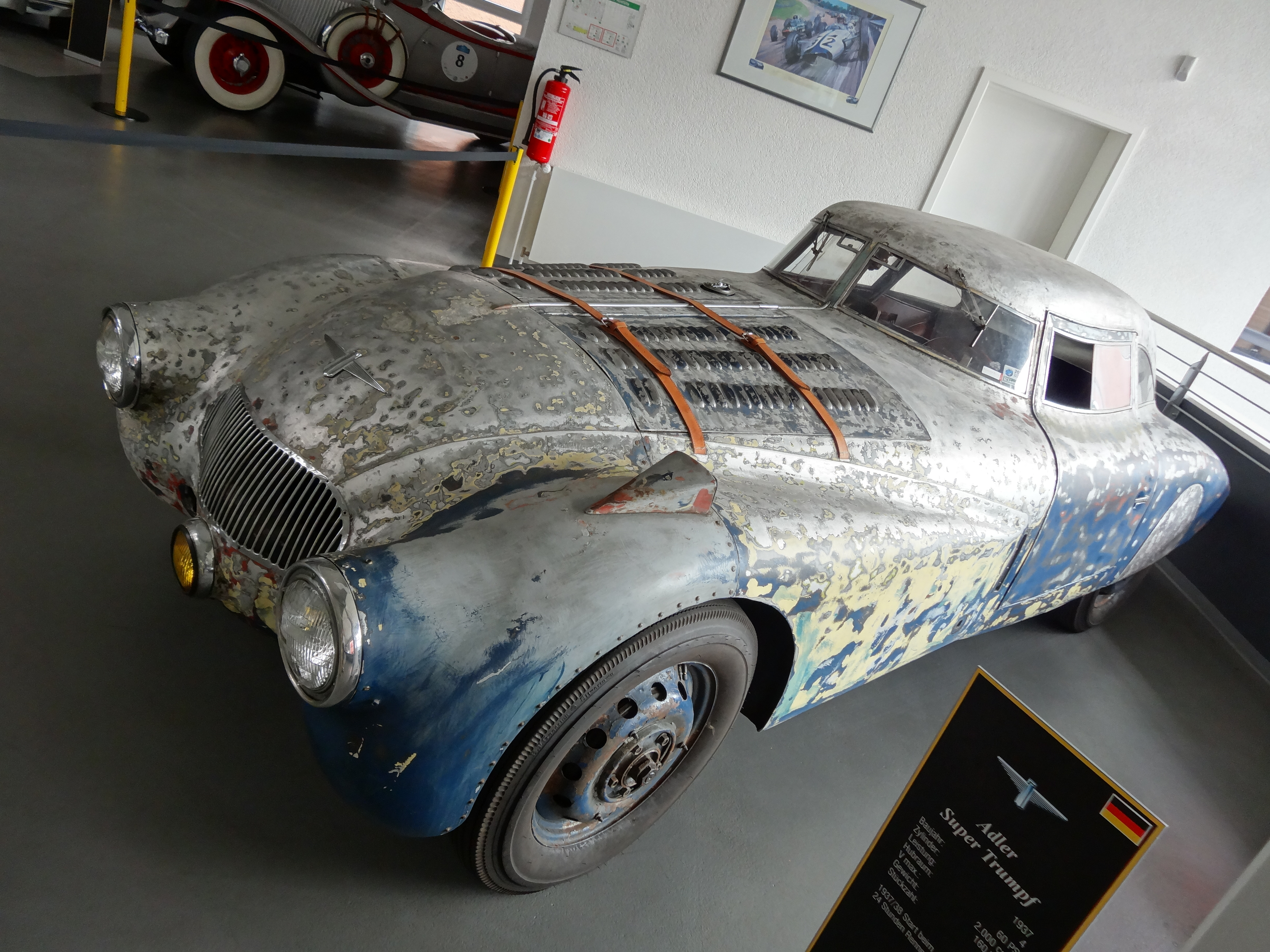 Autosammlung Steim - Schramberg 075 Adler Super Trumpf